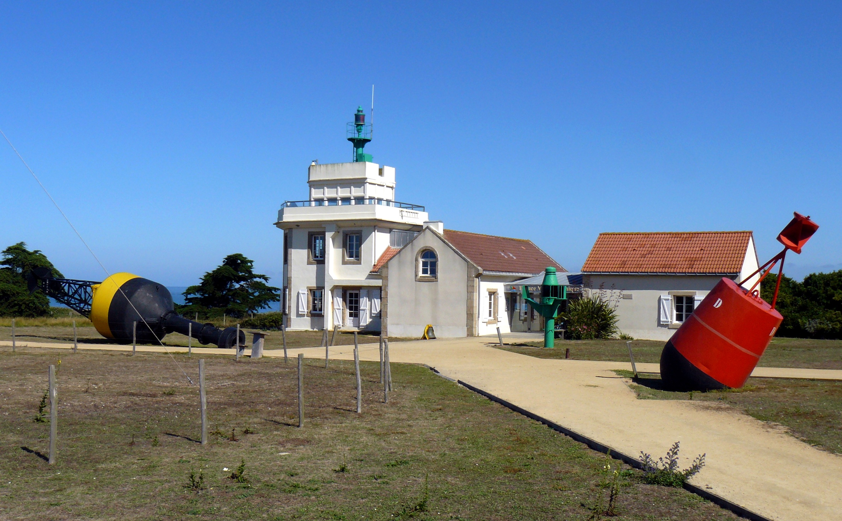 Phare de la Pointe Saint-Gildas (Préfailles, Loire-Atlantique, France)